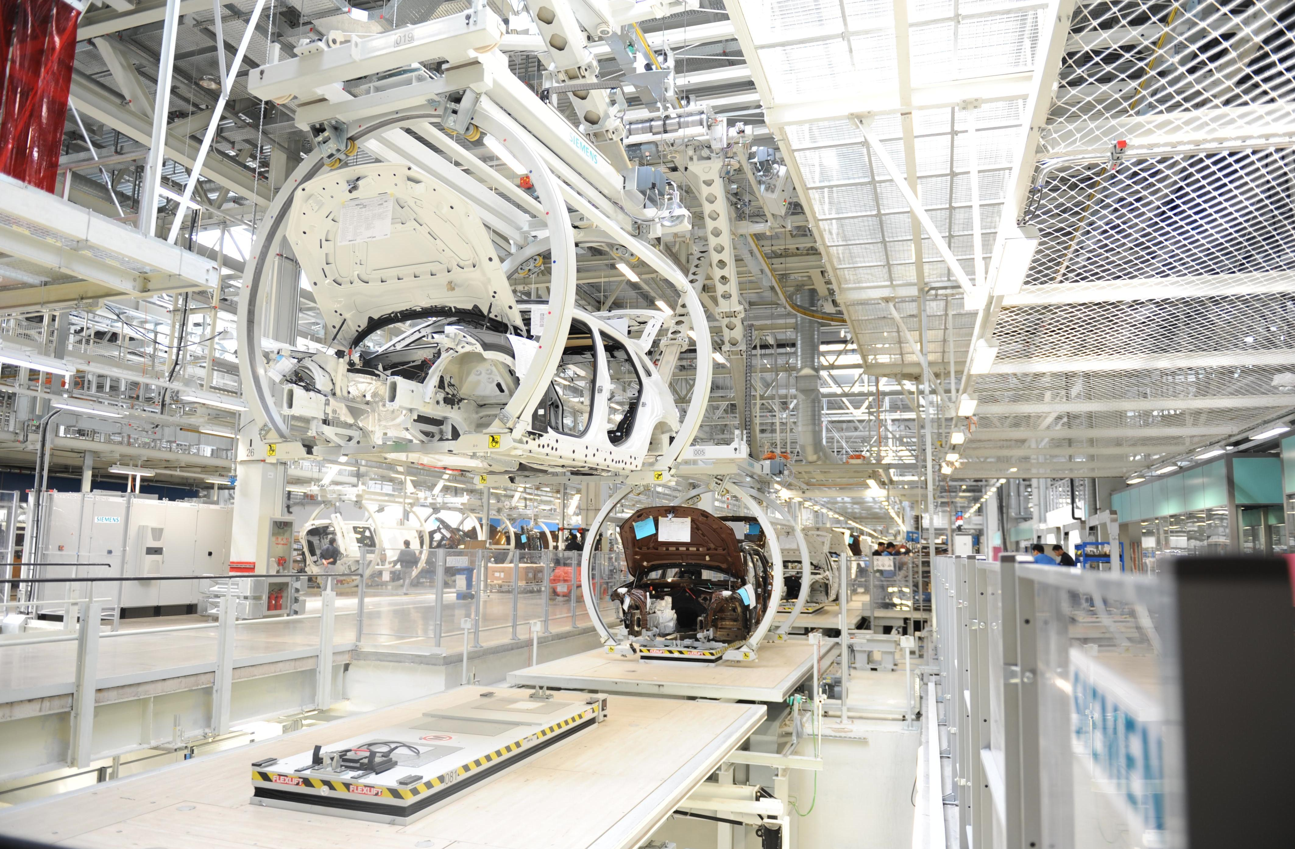 沈阳宝马铁西工厂